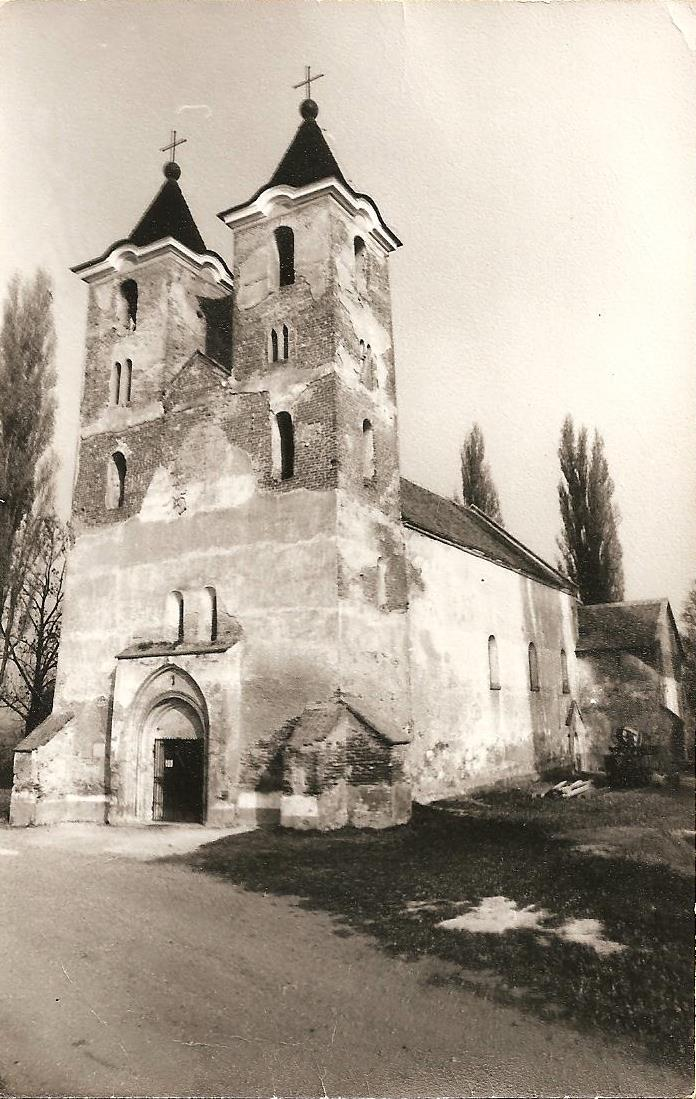 Szent Jakab prépostság régen, még a bevakolt falakkal.